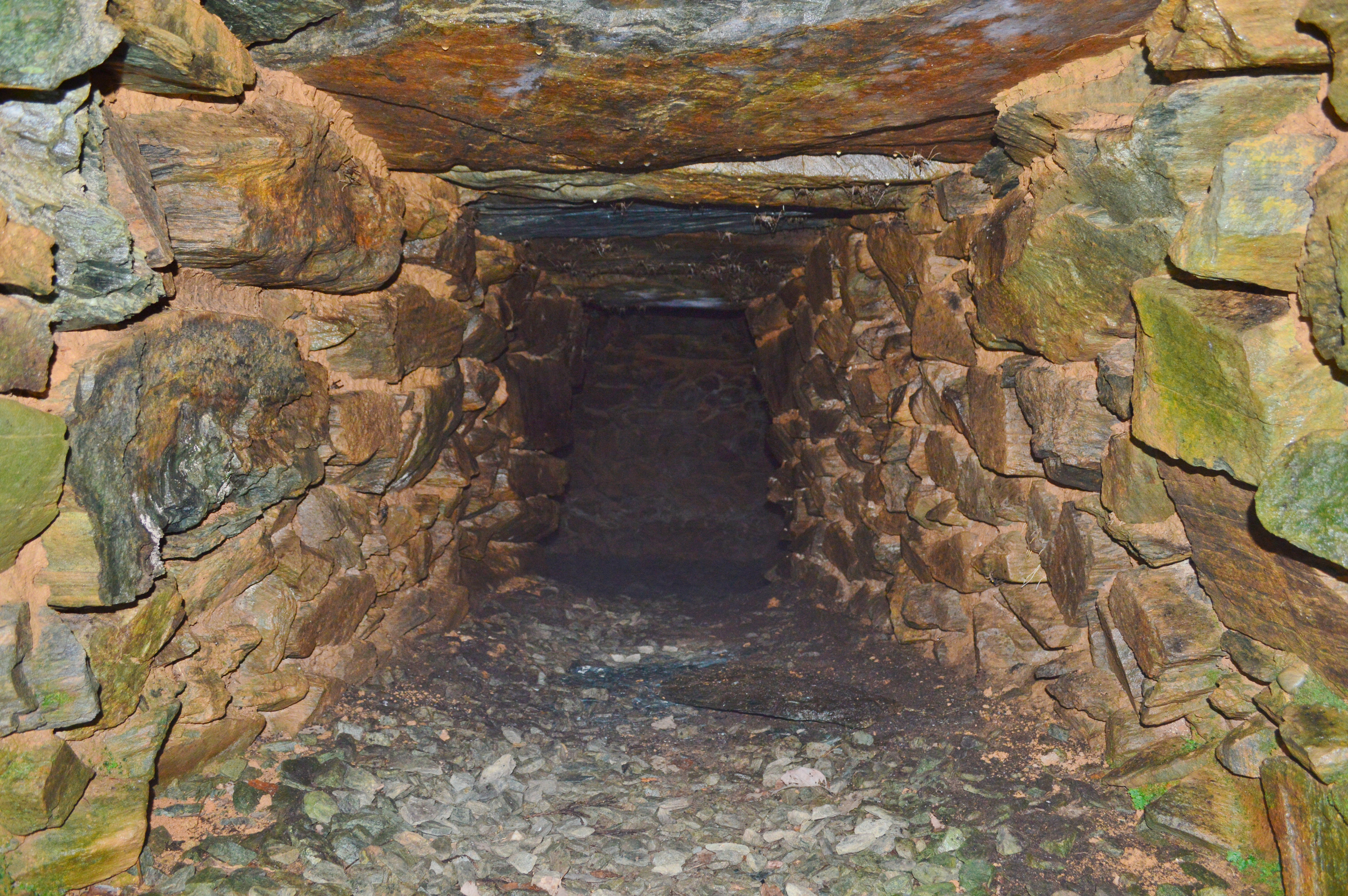 南阿田大塚山古墳 石室羨道